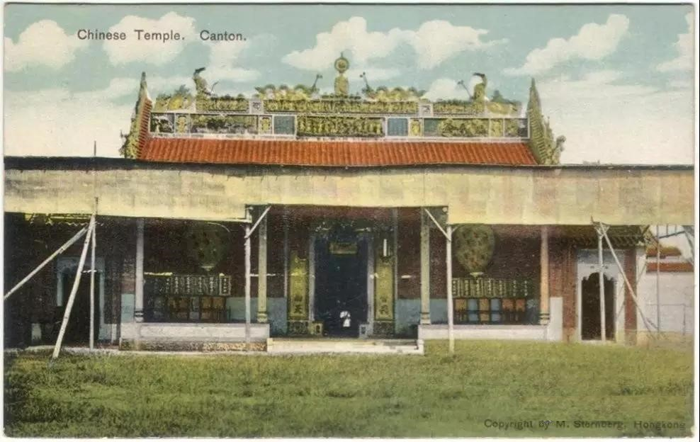 位於廣東省城（廣州市）芳村的黃大仙祠